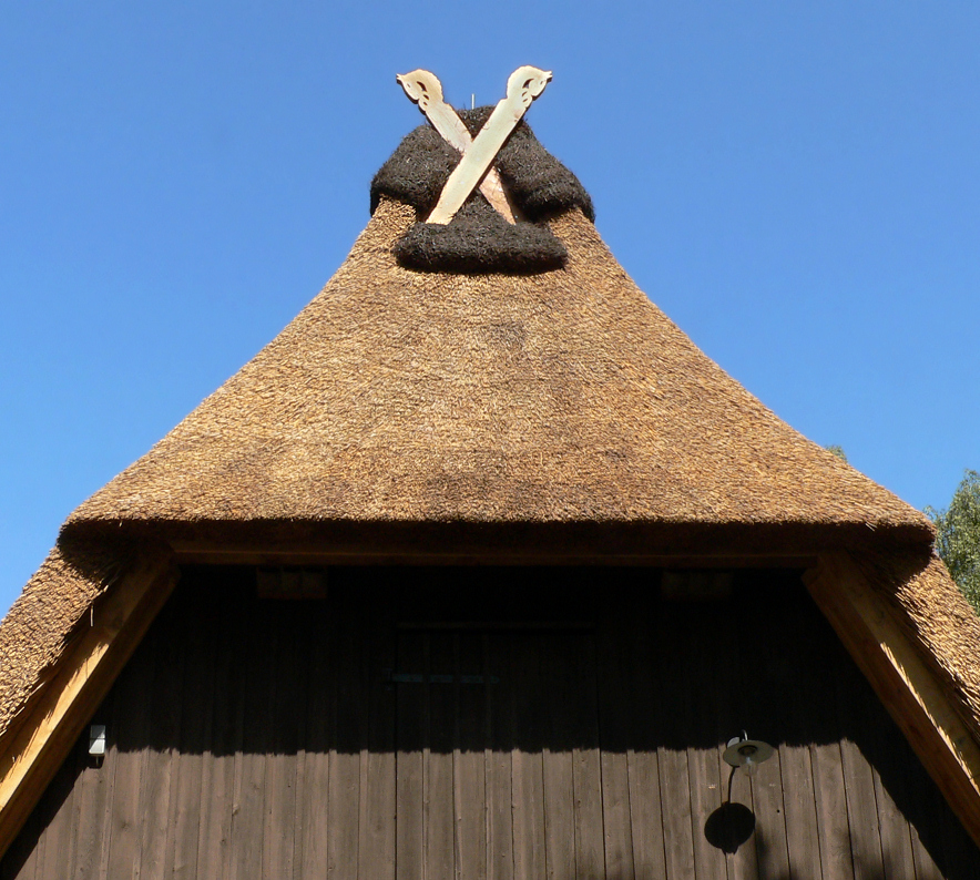 Pferdeköpfe Giebel bei Schneverdingen